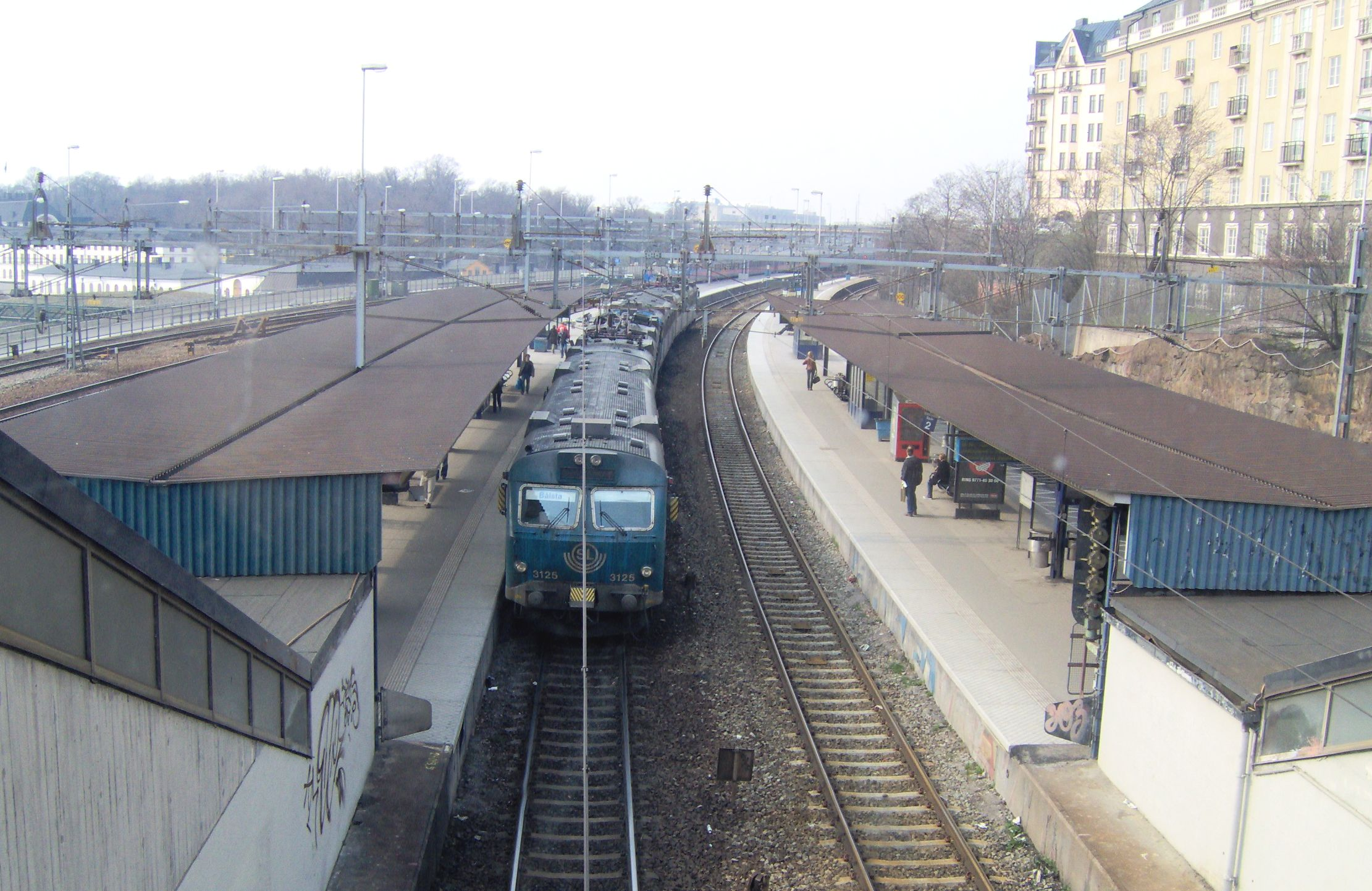 Karlberg station i Stockholm. Till vänster syns Karlbergs slott Karlberg commuter railwaystation in Stockholm, 2 kilometer north of the Stockholm Central station. To the left is Karlbergs castle, a military academy.